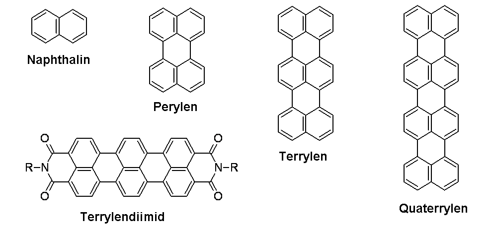 Strukturformeln der Rylen-Farbstoffe